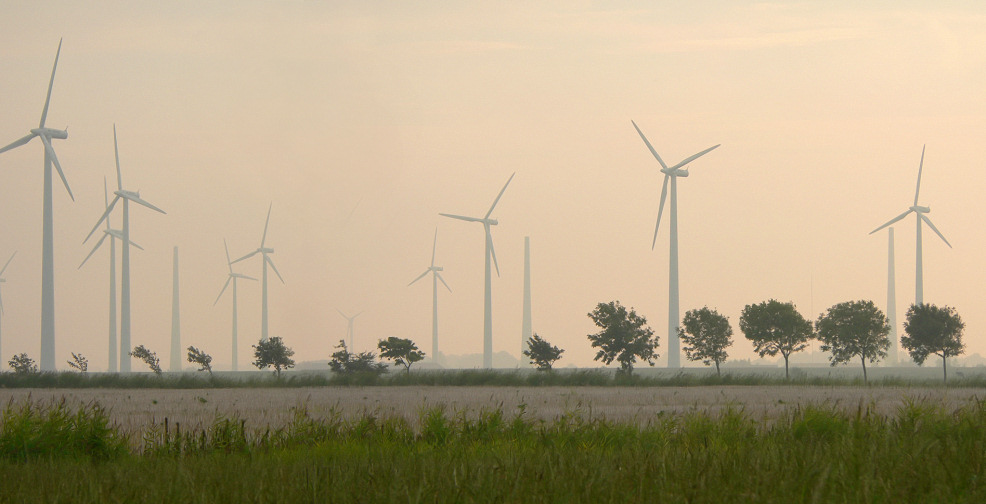 Windpark Bassens Foto aufgenommen von Benutzer Benutzer:AxelHH, August 2006